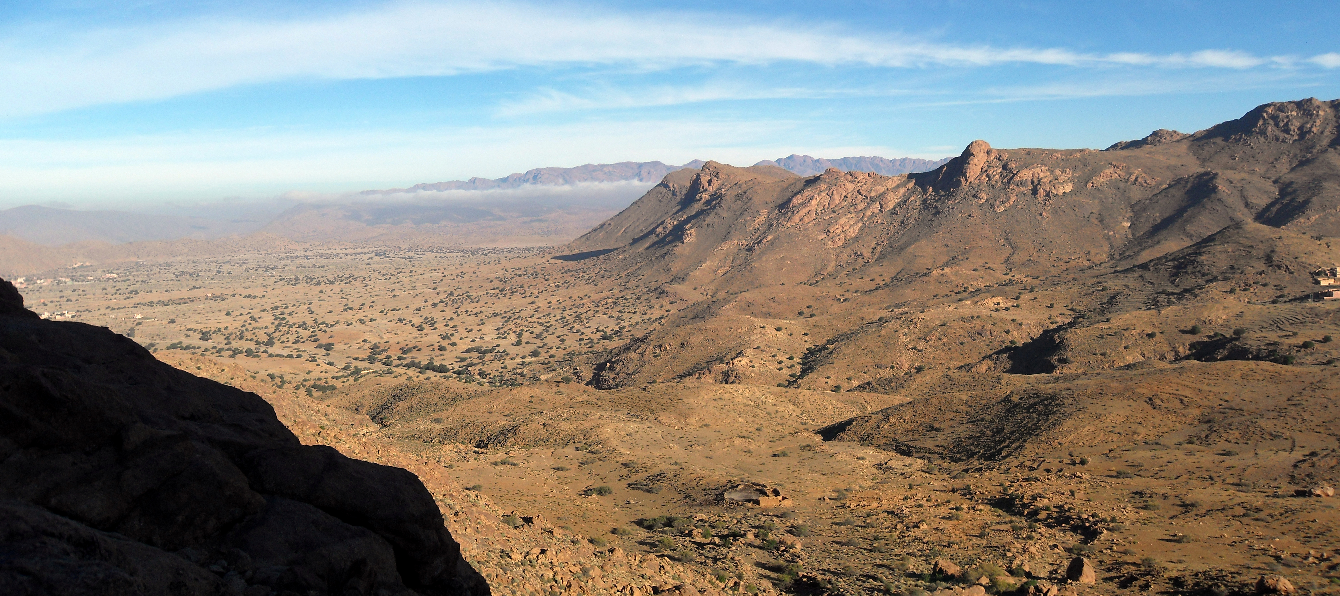 Tafraout